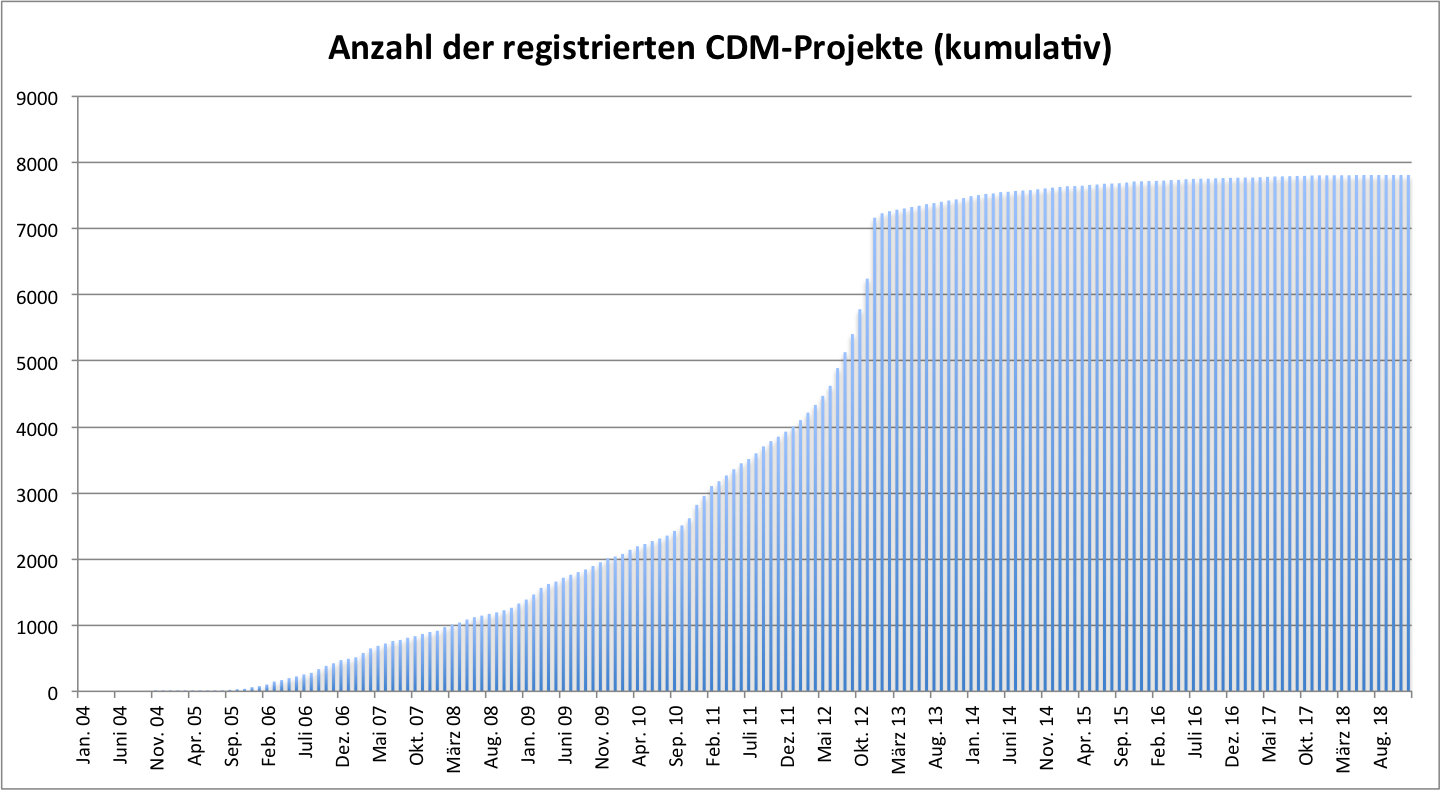 Anzahl der registrierten CDM Projekte kumulativ (Balkendiagramm)